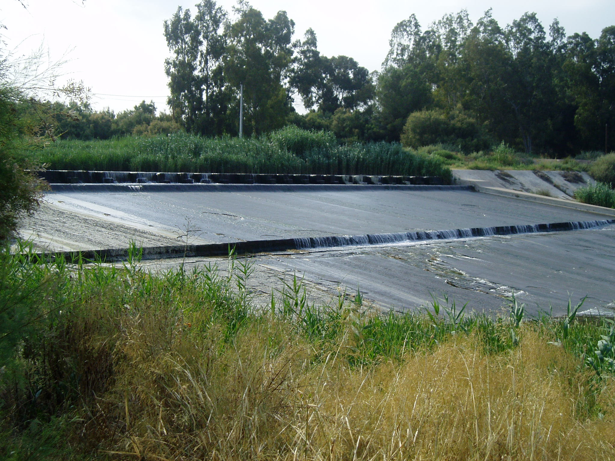 Foto de la contraparada de Javalí Nuevo